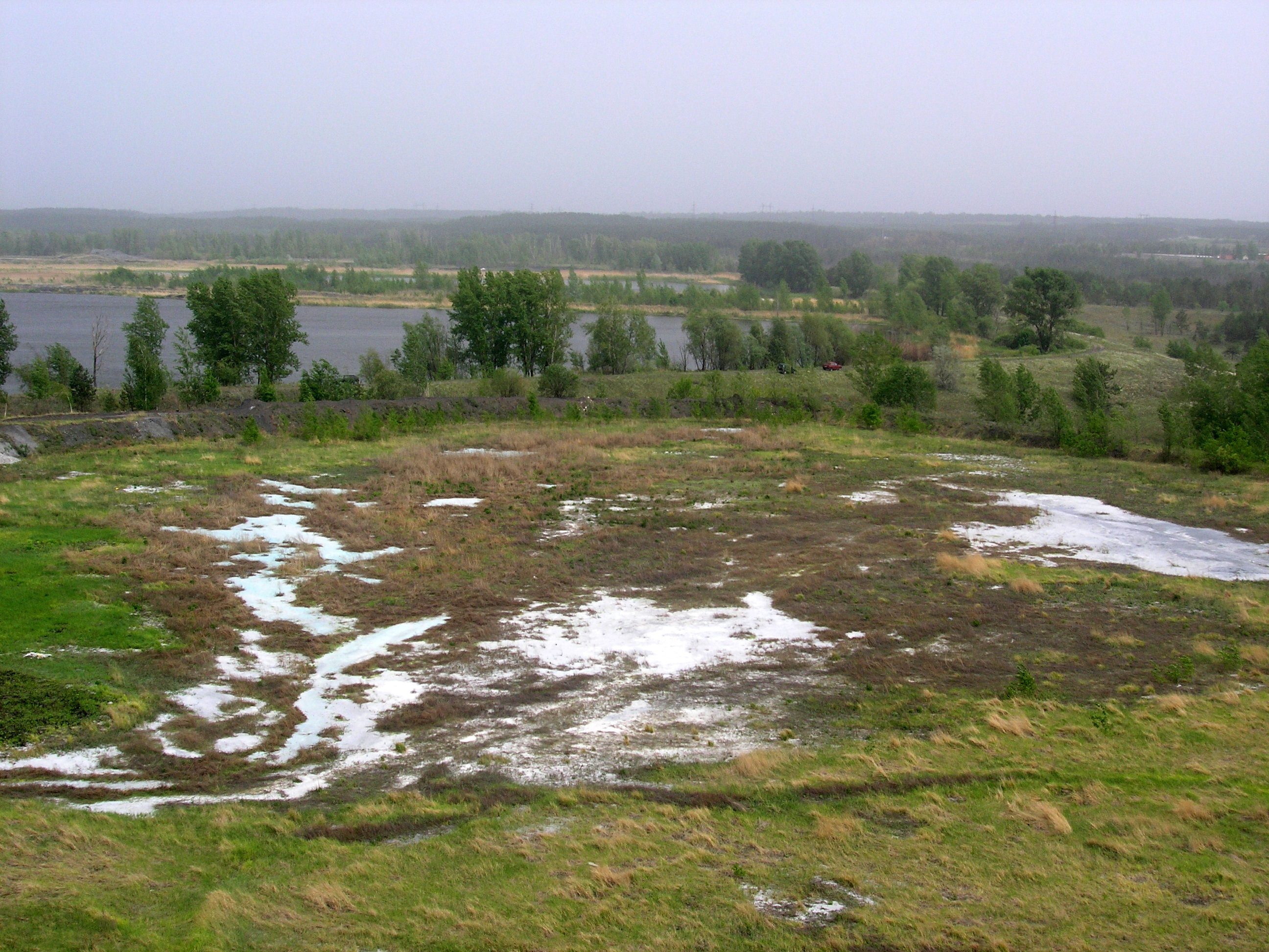 Загрязнение почвы известью. Тольятти